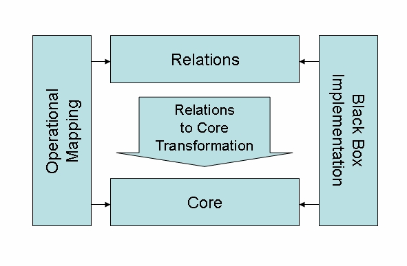 QVT Language Architecture